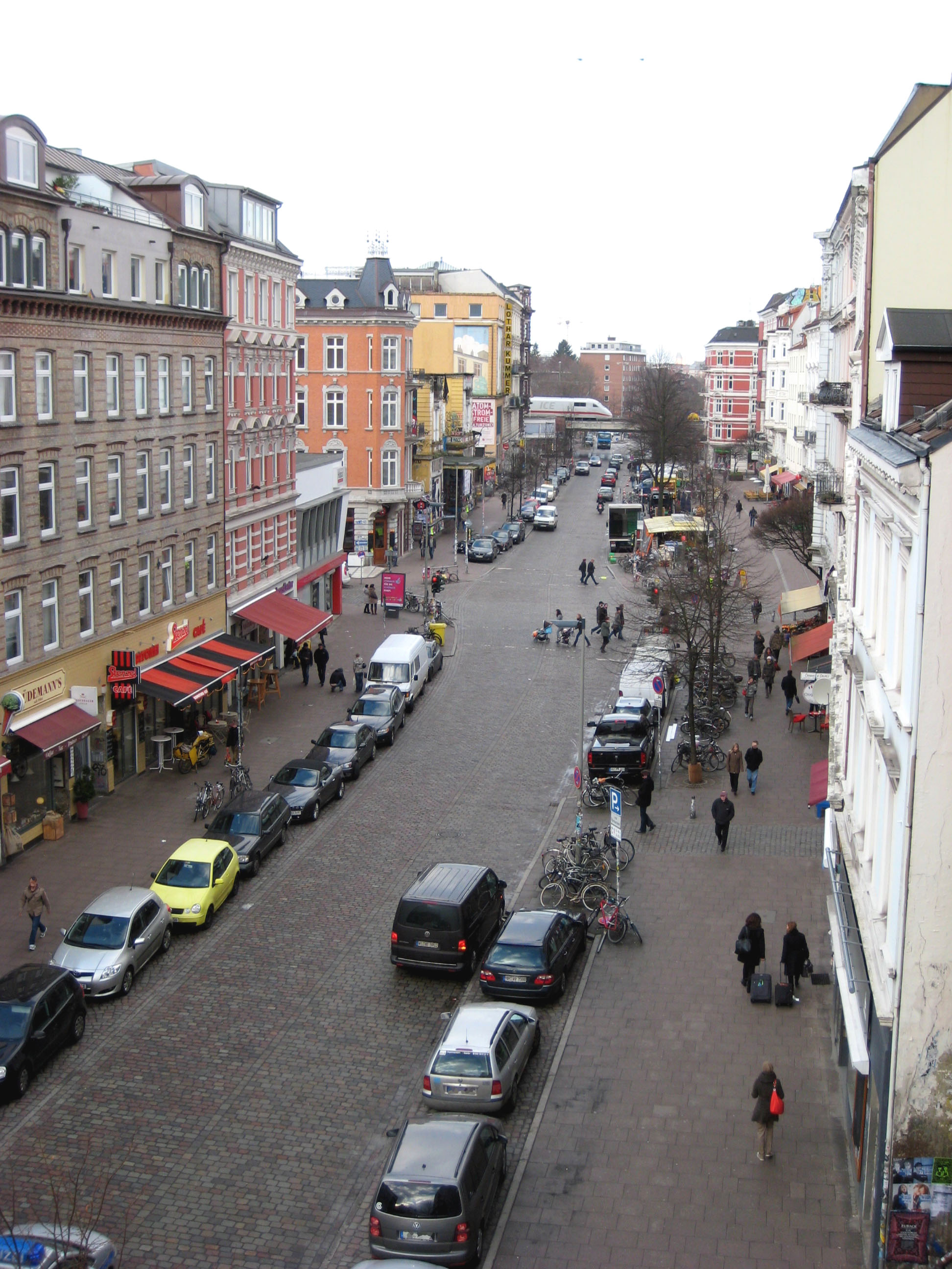 Straße Schulterblatt, 2011